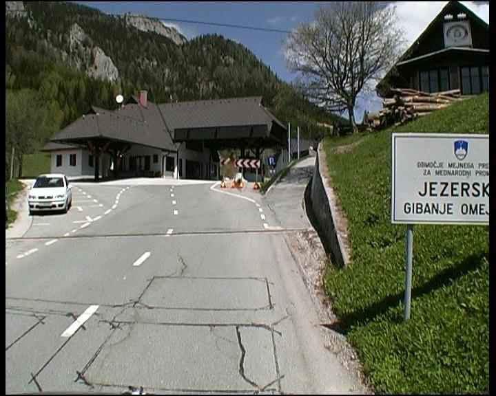 Mednarodni mejni prehod Jezersko.